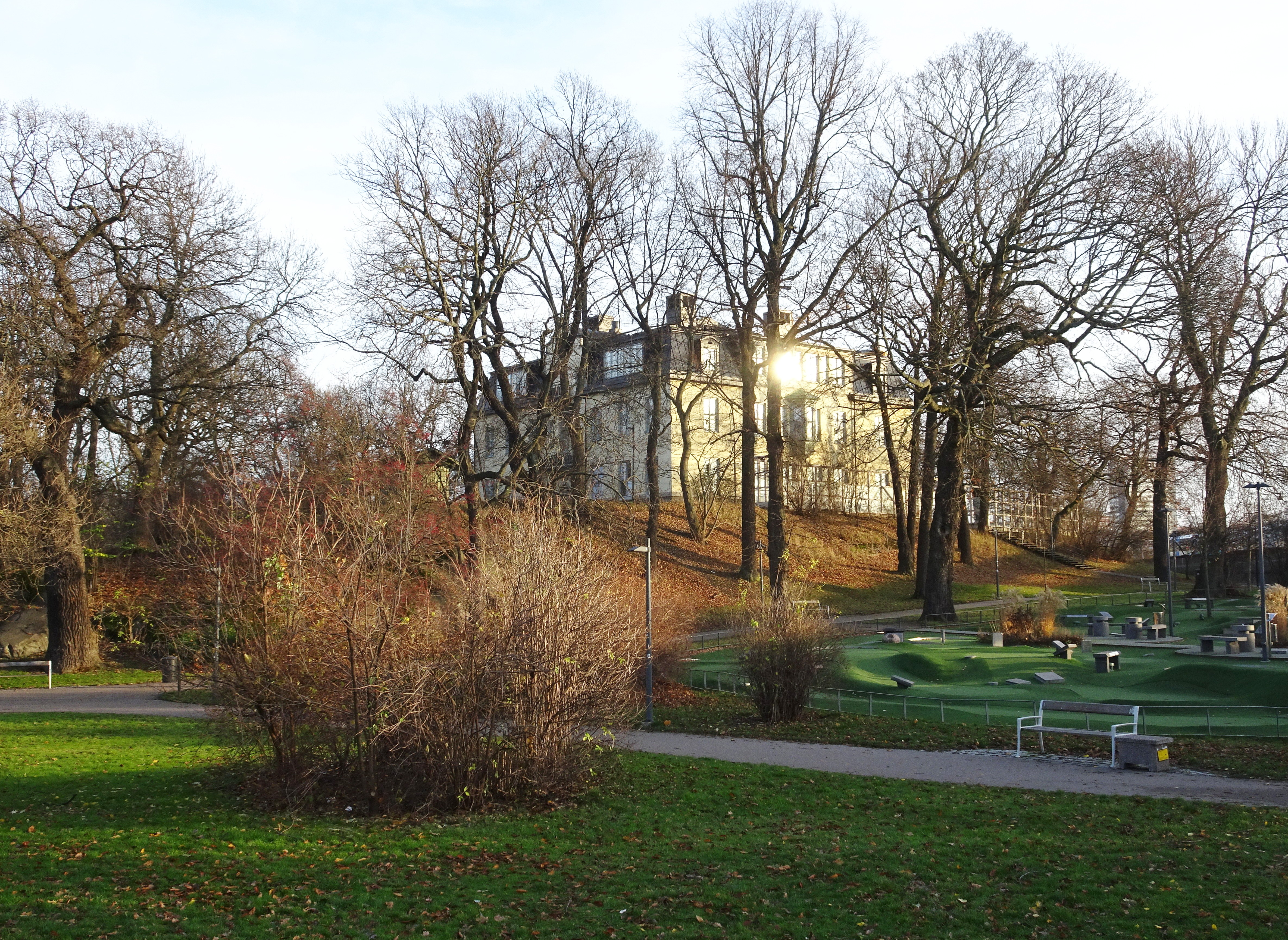 Kristinebergsskolan, s.k. "Kullskolan" på Kristinebergs slottsområde. Nybyggnadsår 1906 - 1906 Ludwig Peterson (Arkitekt) Frimurarbarnhusets direktion (Byggherre) Jakob Sjökvist (Byggmästare)